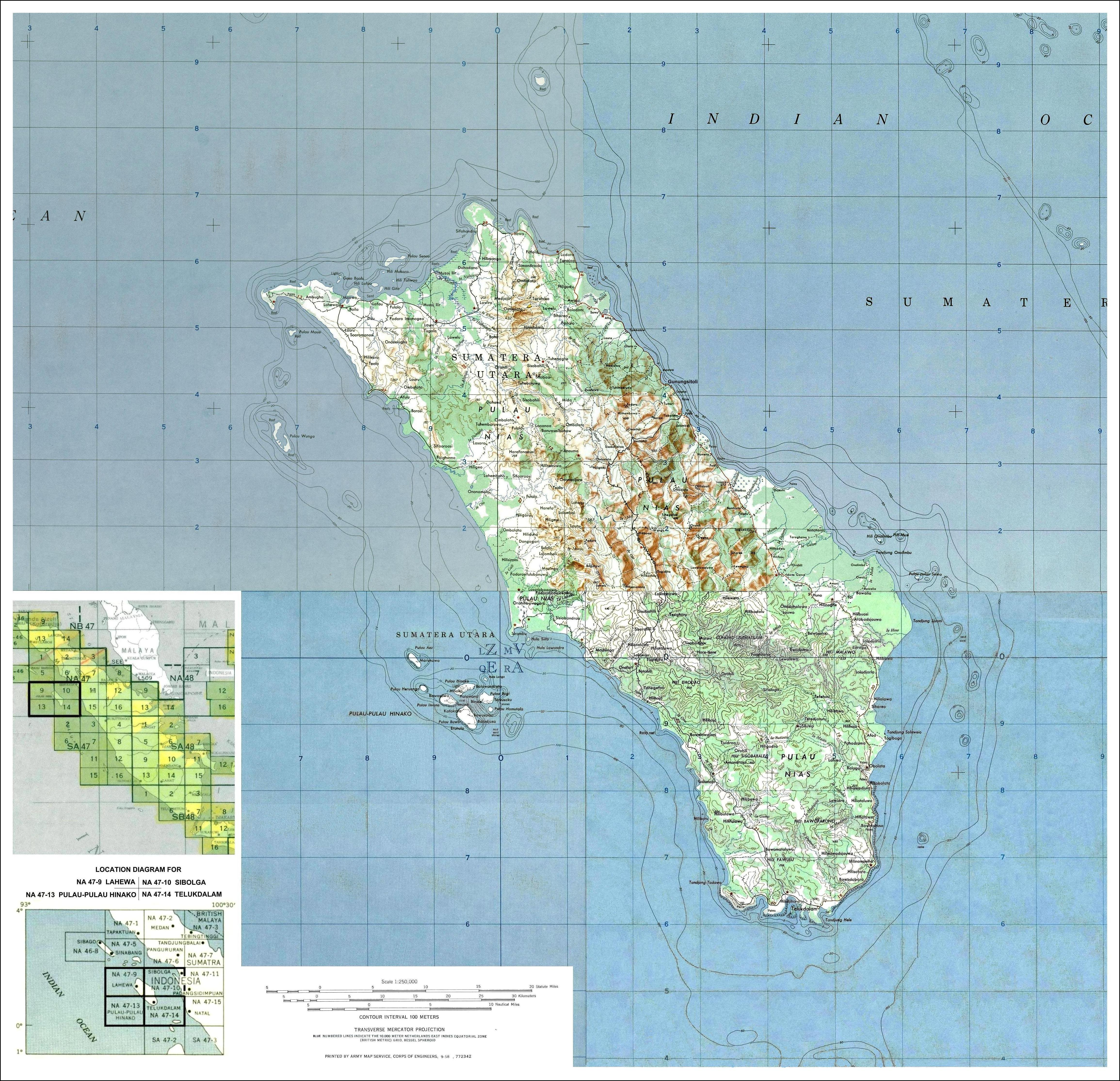 Insel Nias vor der Westküste Sumatras